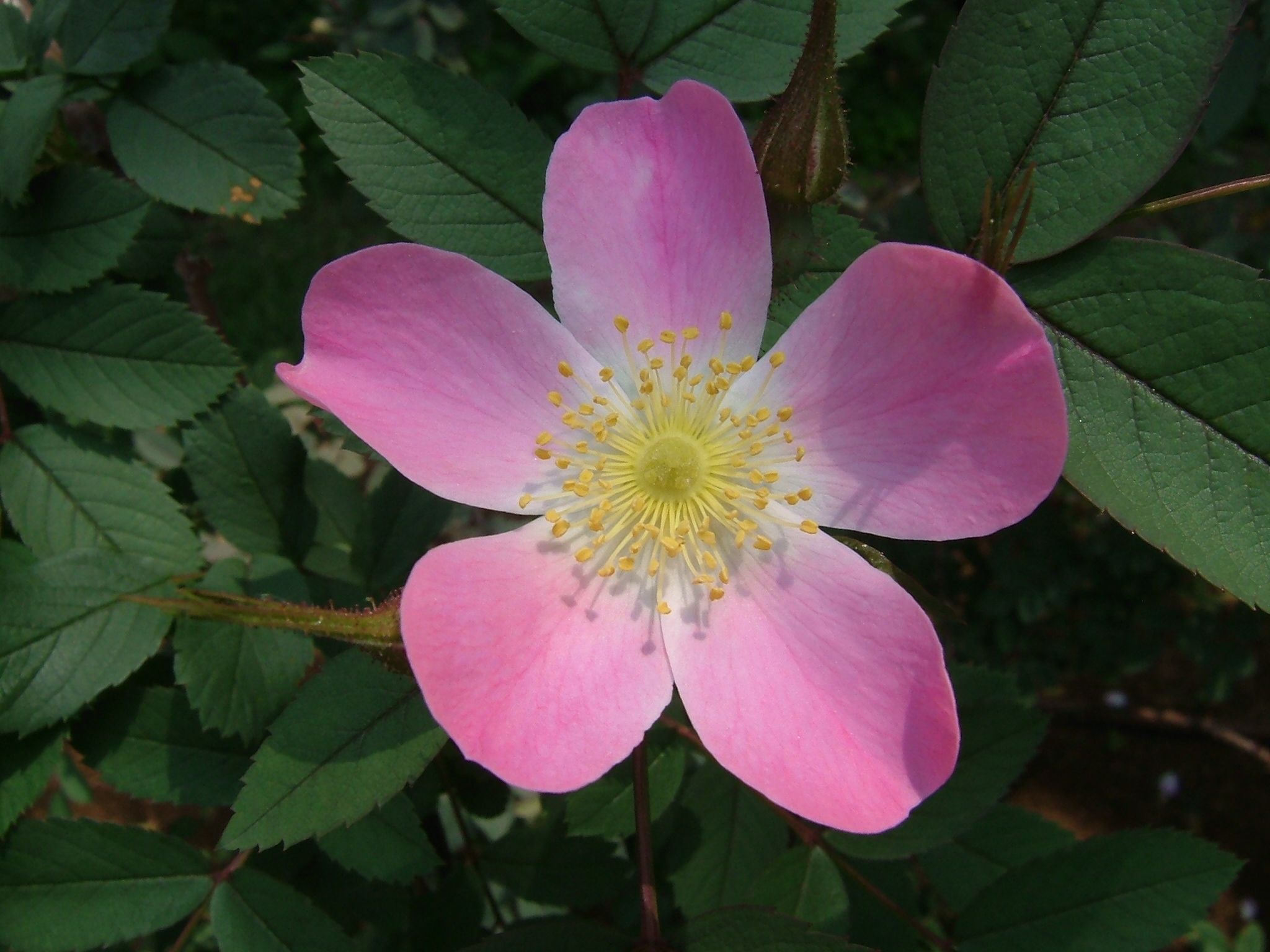 ロサ グラウカ Rosa glauca